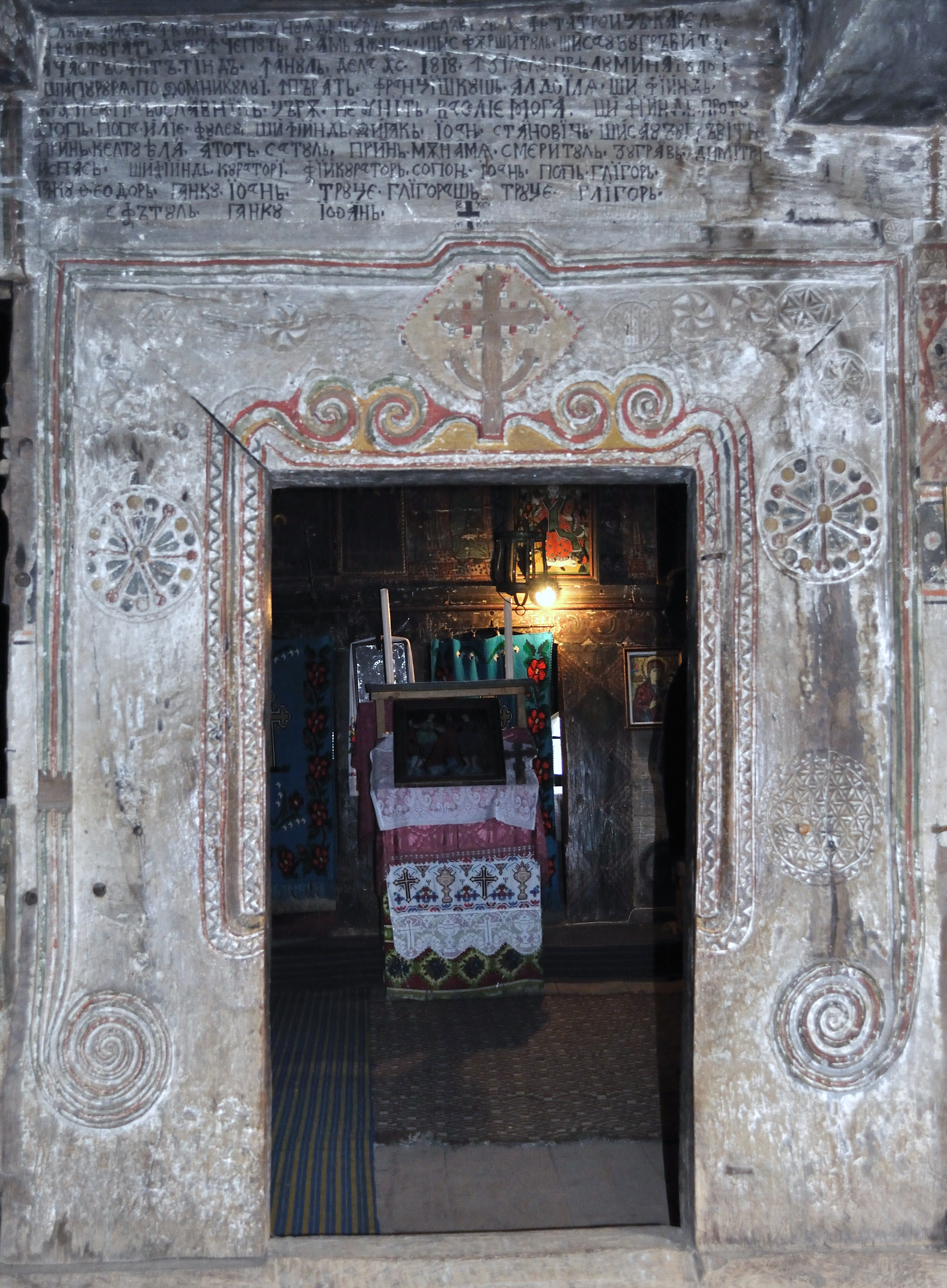 Biserica de lemn din Agârbiciu, județul Cluj